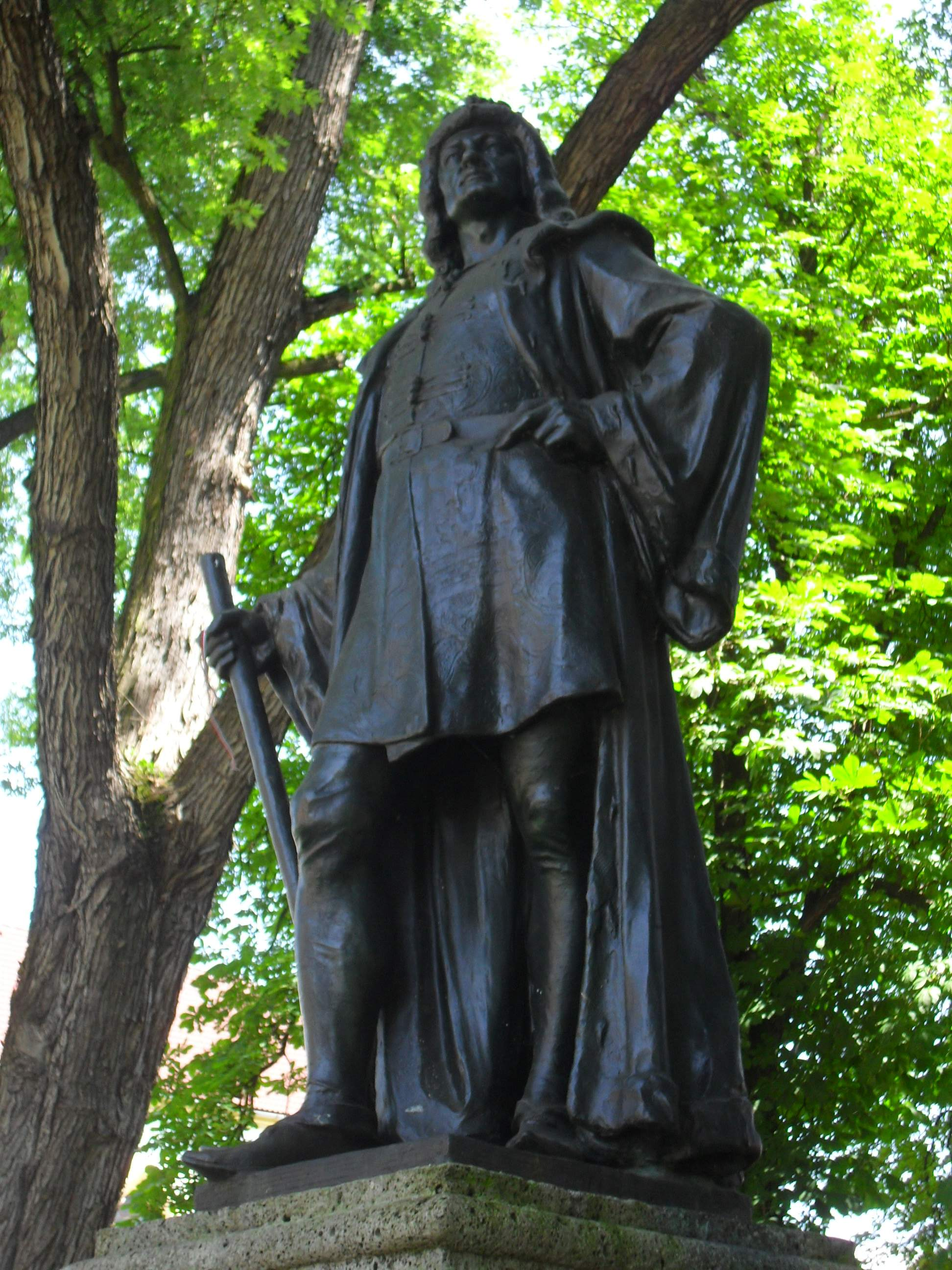 Sajógömör - Mátyás király szobra